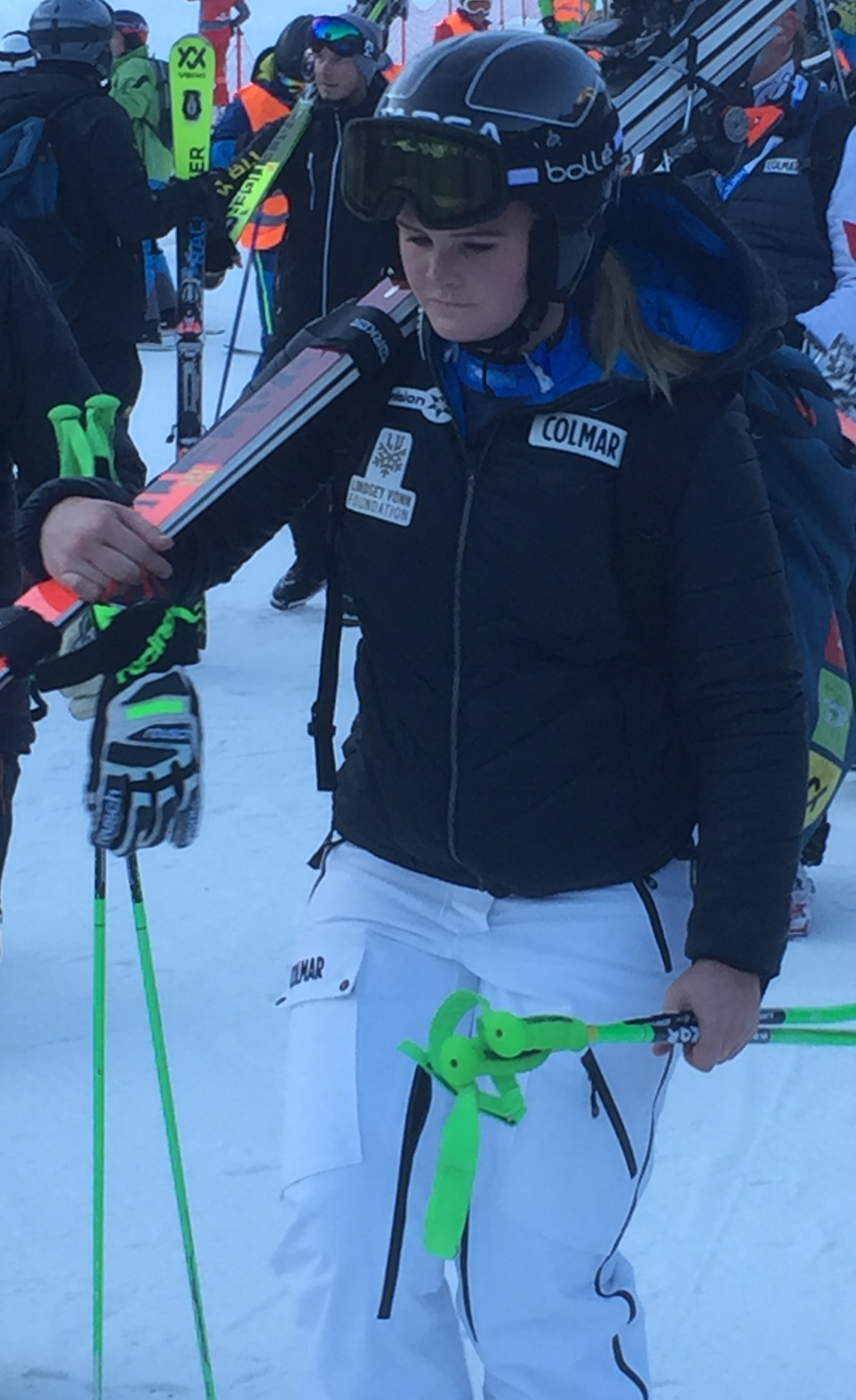 La sciatrice neozelandese Alice Robinson a Soelden nel 2019